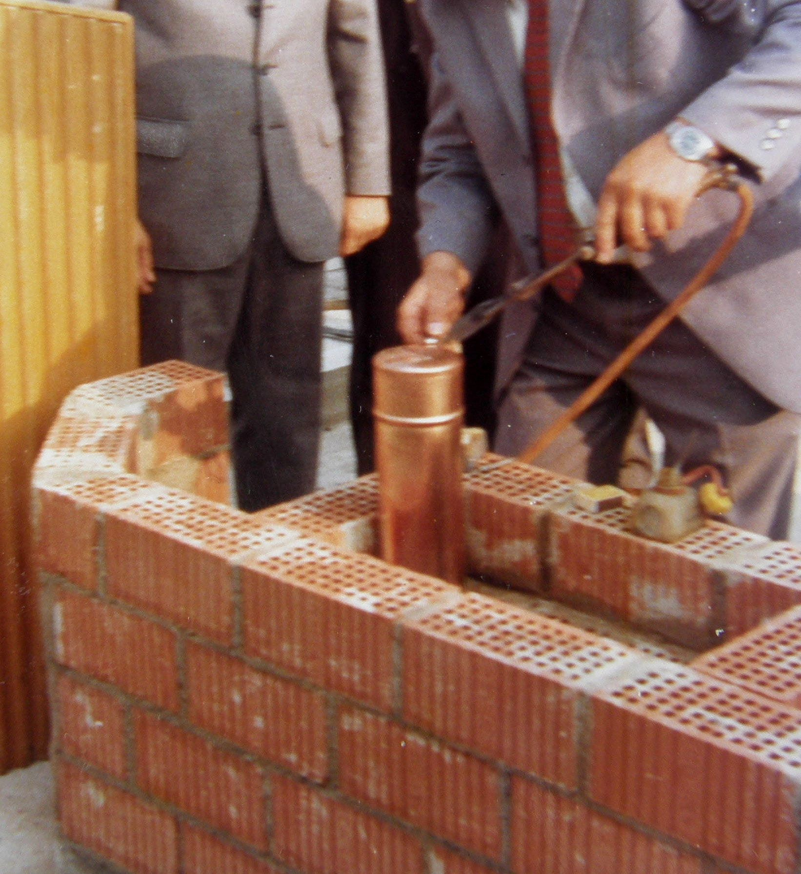 Zeitkapsel (Kupferbehälter) wird bei einer Grundsteinlegung durch Weichlöten wasserdicht verschlossen.